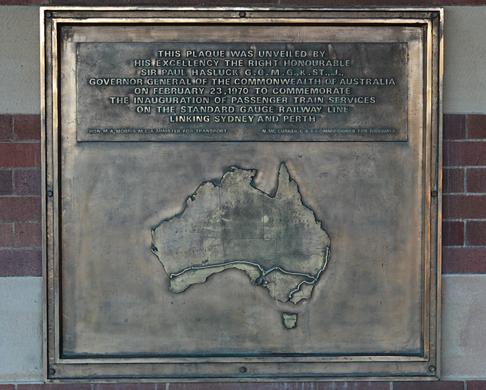 En minnestavla som avslöjades vid Sydneys centralstation 1970 i samband med att den normalspåriga förbindelsen mellan Sydney och Perth invigdes.